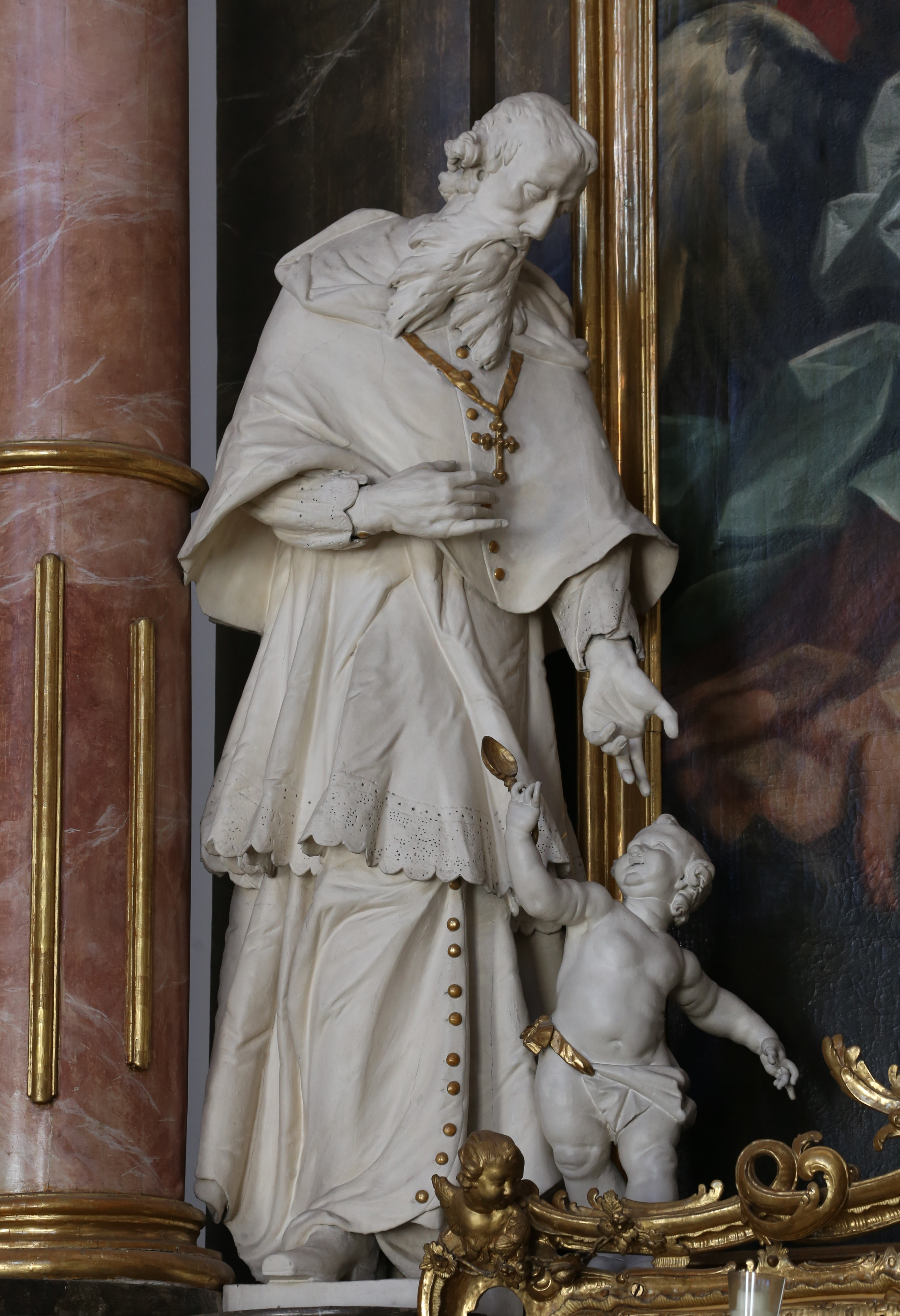 St. Peter und Paul, Neustift, Freising; Rokokokirche, Norbert-Altar; Altarblatt von Sebastian Engelhardt (oder Cosmas Damian Asam), Vision des hl. Norbert; Statuen: Augustinus und Hermann Joseph von Steinfeld von Joseph Angerer